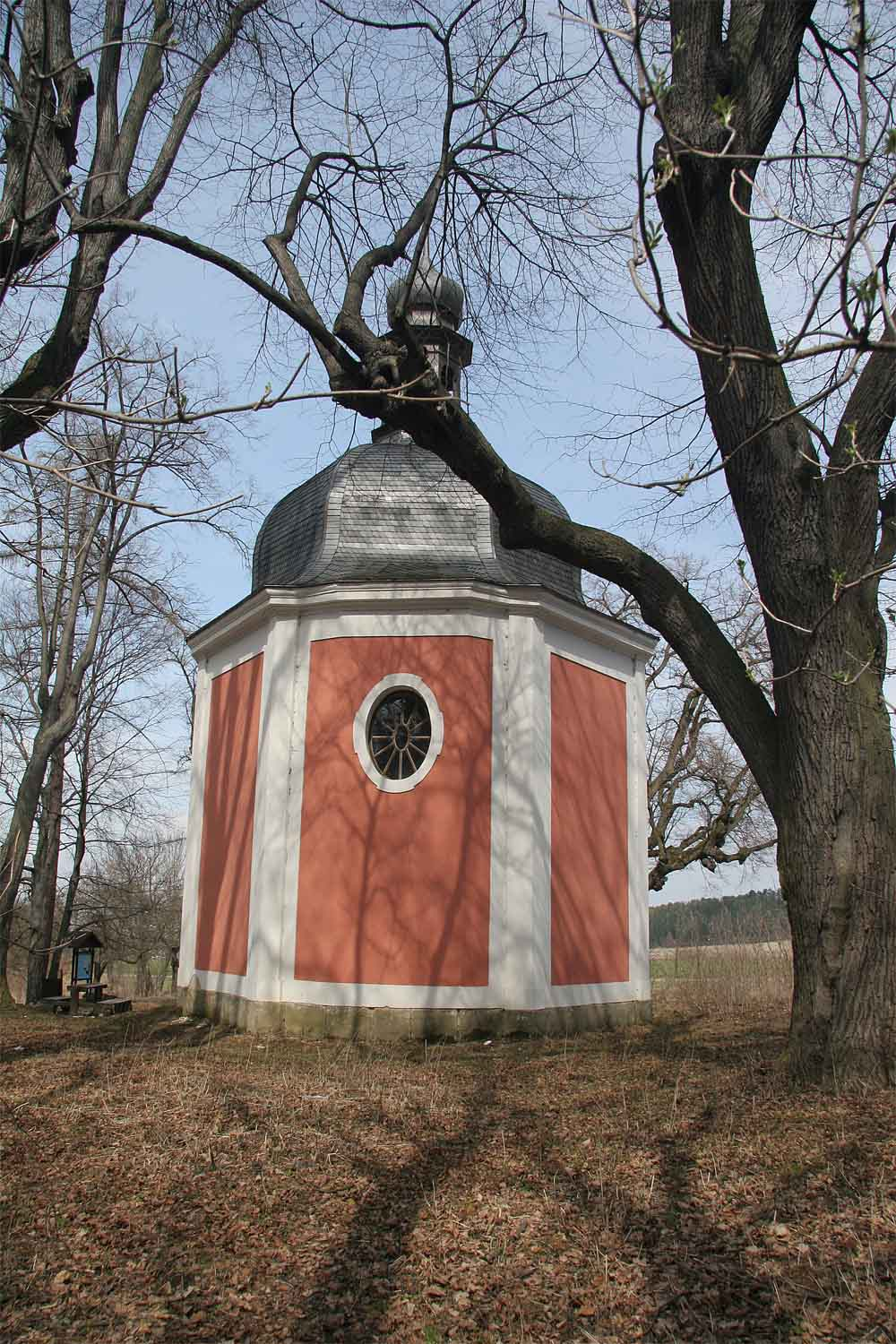 Česky: Luže, okres Chrudim. Barokní Paletínská kaple.